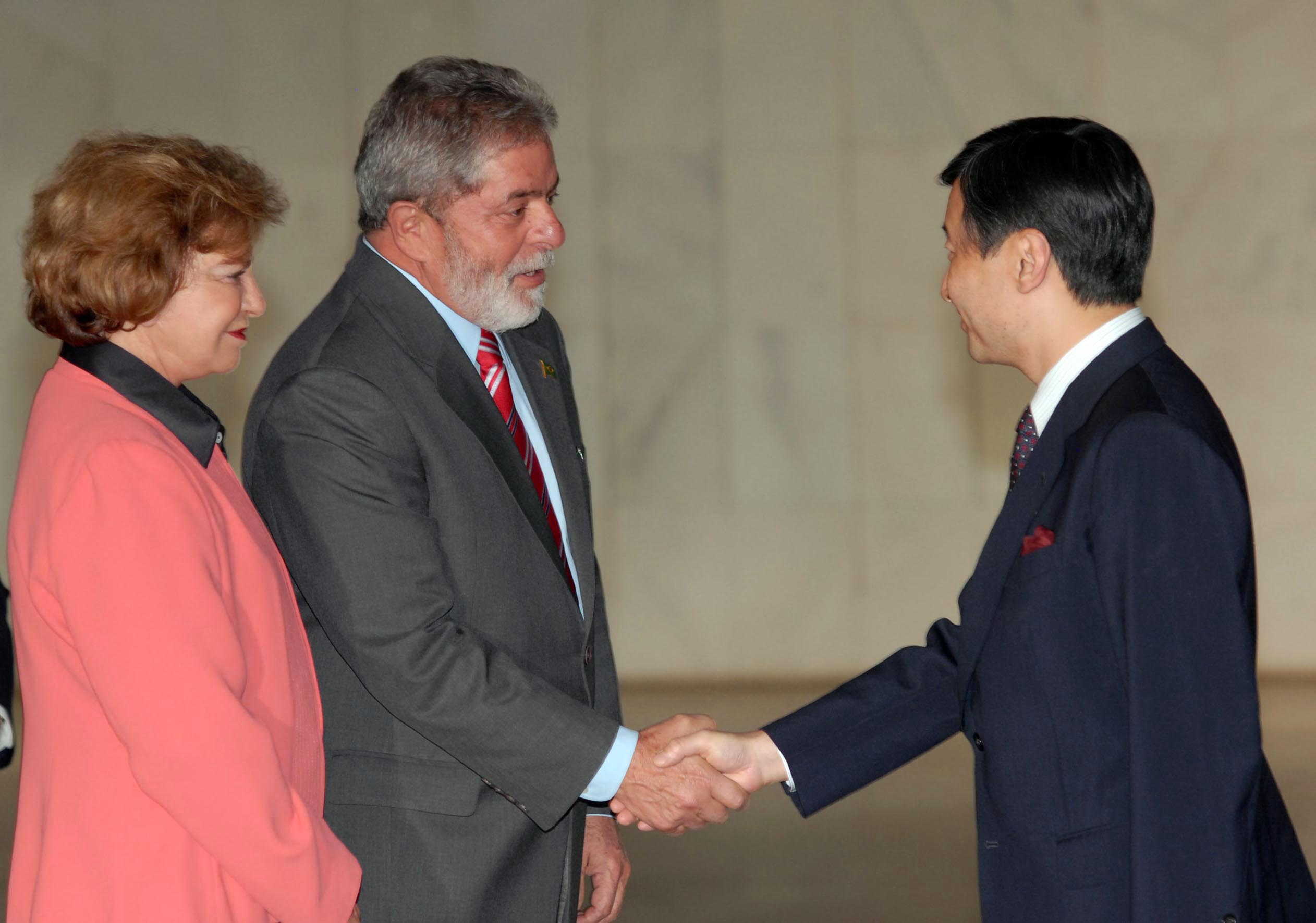 Queima de fogos de artifício em comemoração aos 100 anos da imigração japonesa no Brasil, na Esplanada dos Ministérios